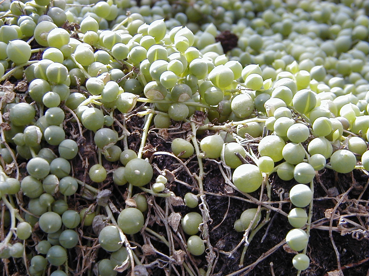 Senecio rowleyanus. Real Jardín Botánico, Madrid, España.